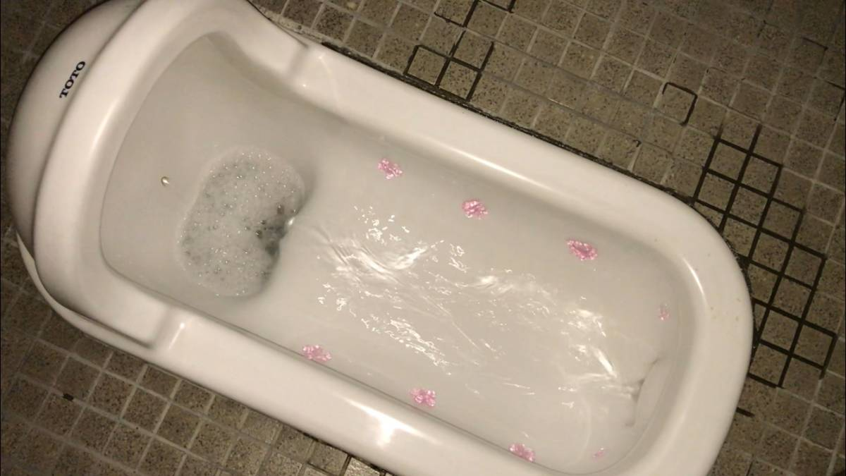 デコラル75